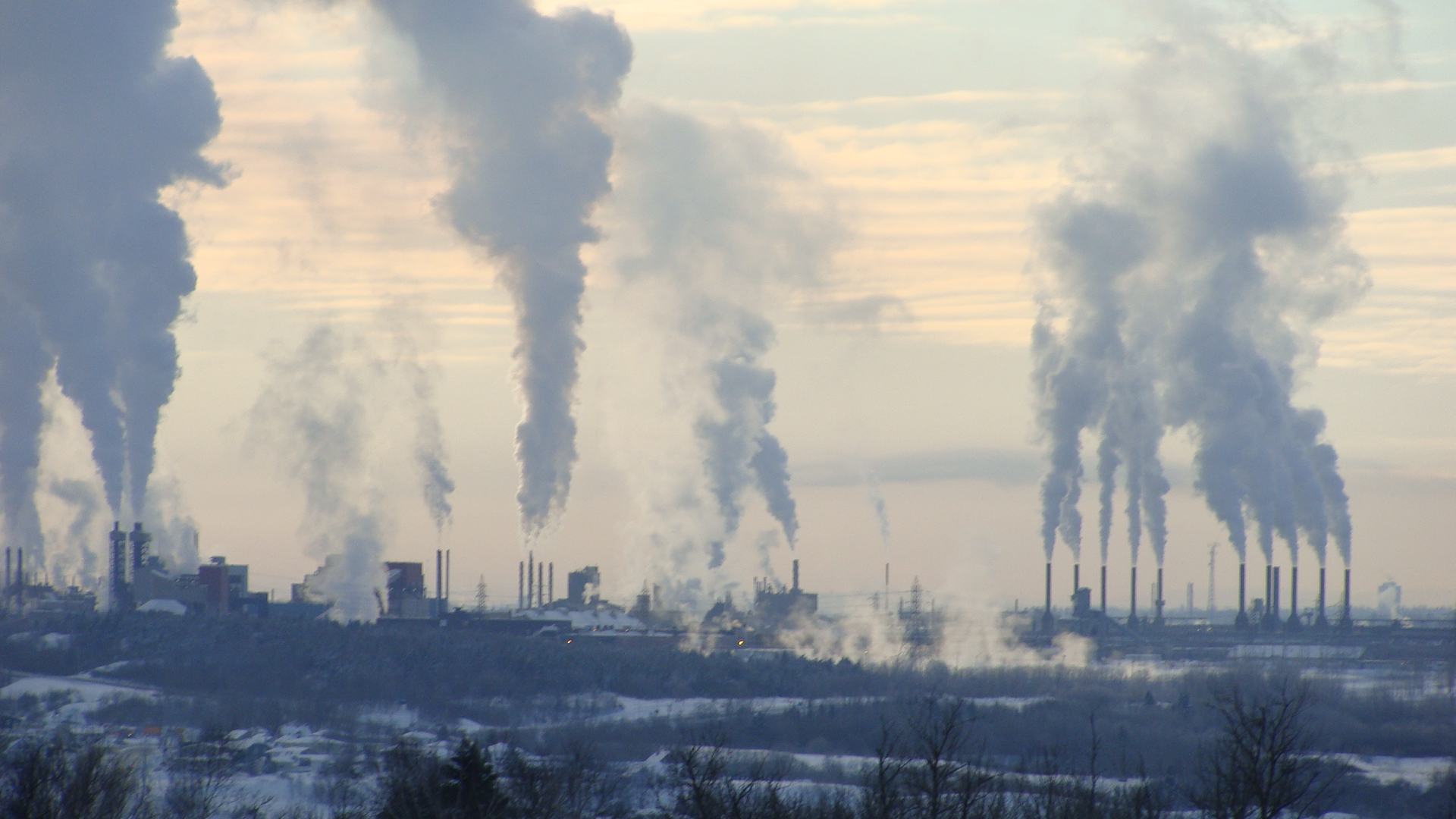 Installations de Rio-Tinto-Alcan à Arvida, au Saguenay (Québec, Canada).